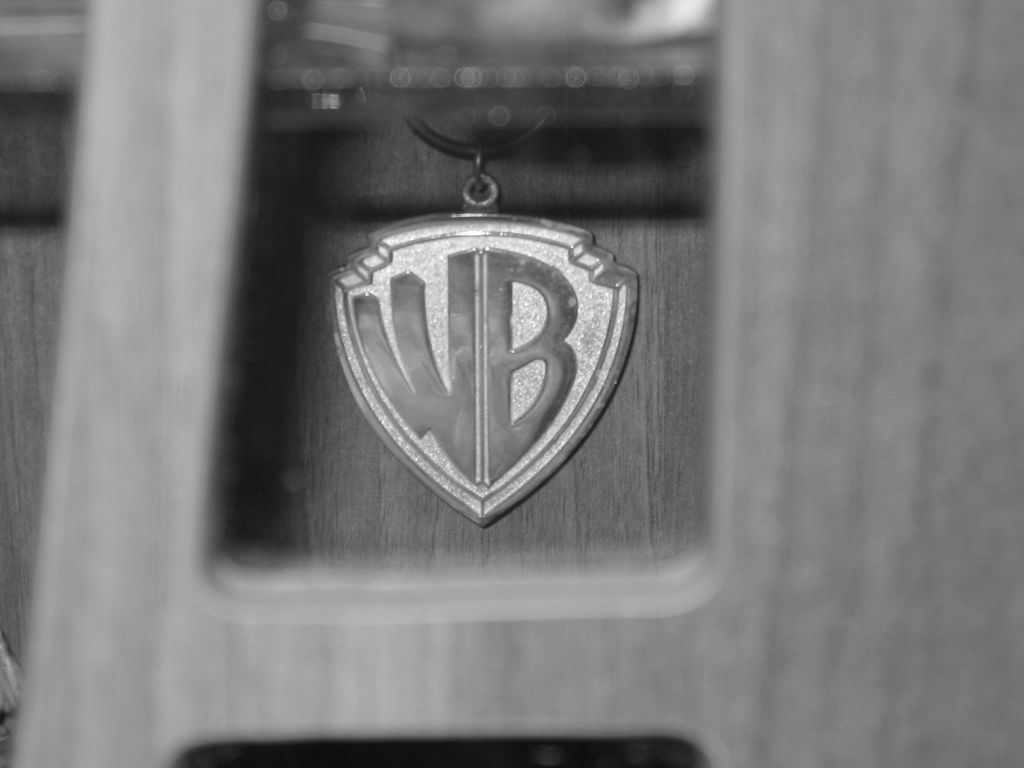 Un pendentif des studios WB